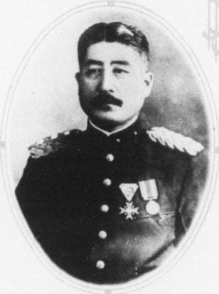 富島元治（1874-1945）